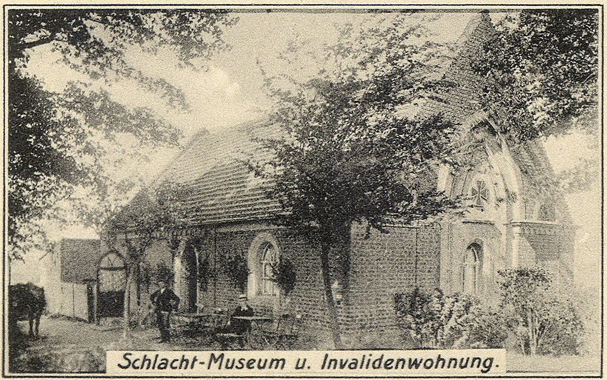 Dennewitz, Schlachtenmuseum und Invalidenwohnung (Anno Pief)